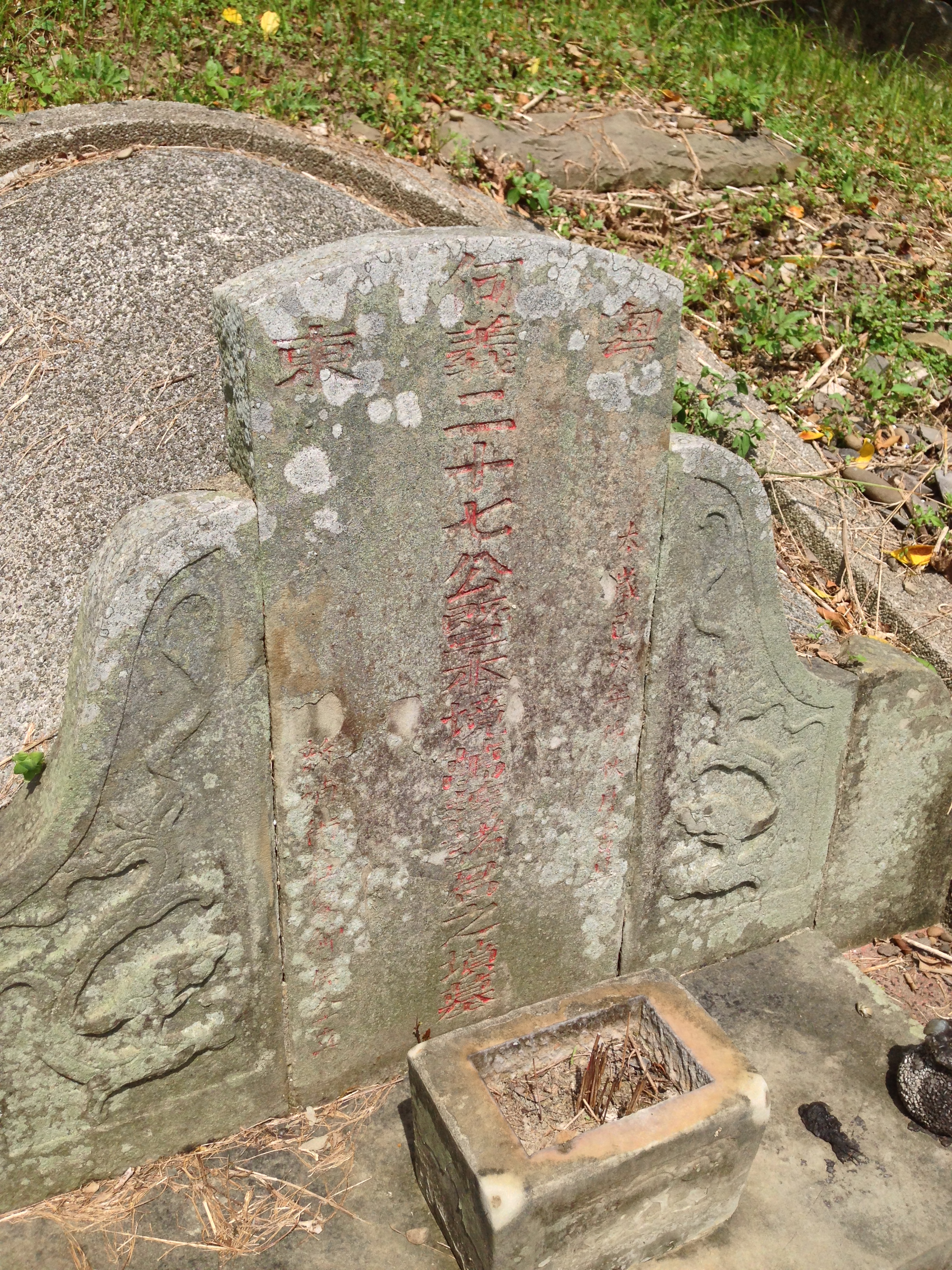 中文（台灣）: 向義二十七公暨本境萬善諸君墓碑